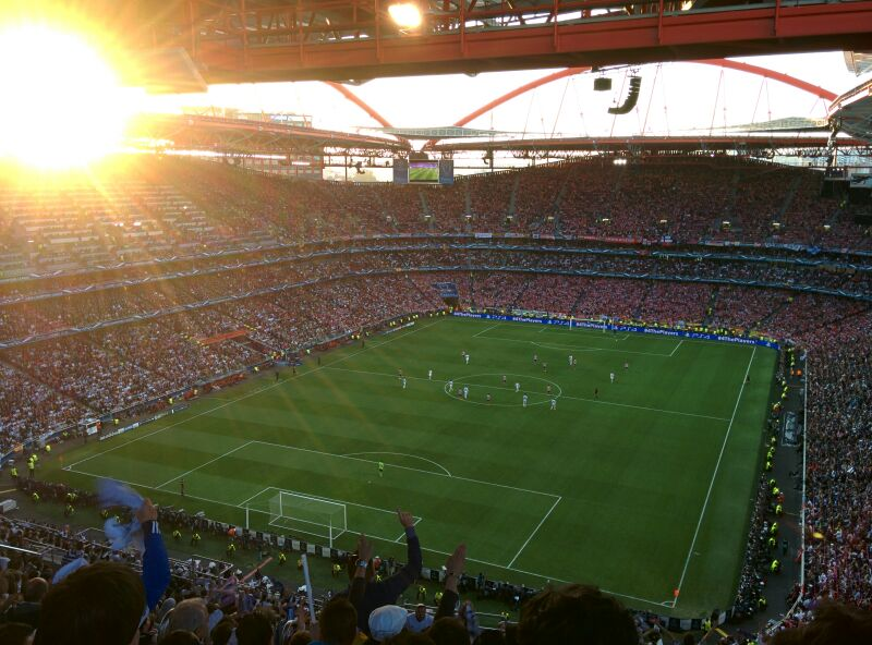 Real Madird 4:1 Atletico 2014 Final Champions Lisboa